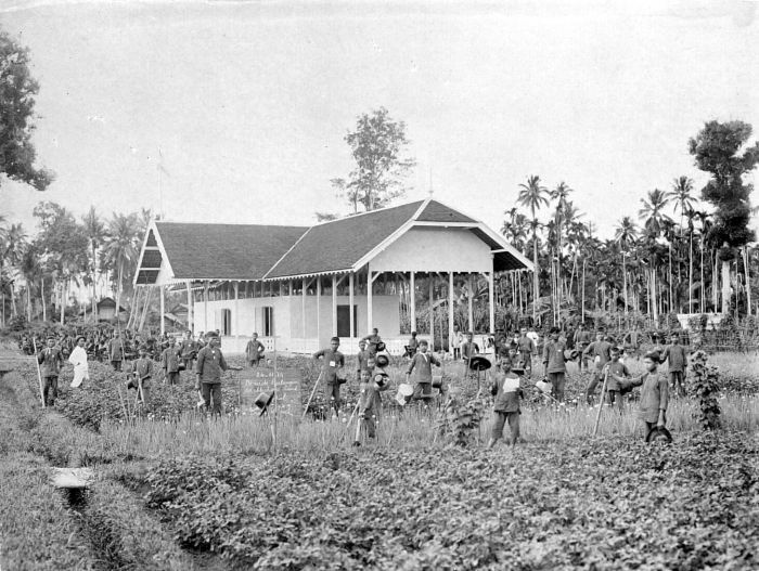 Repronegatief. Eerste Acehse Landbouwschool te Beurunun aan de noordkust van Aceh, Sumatra